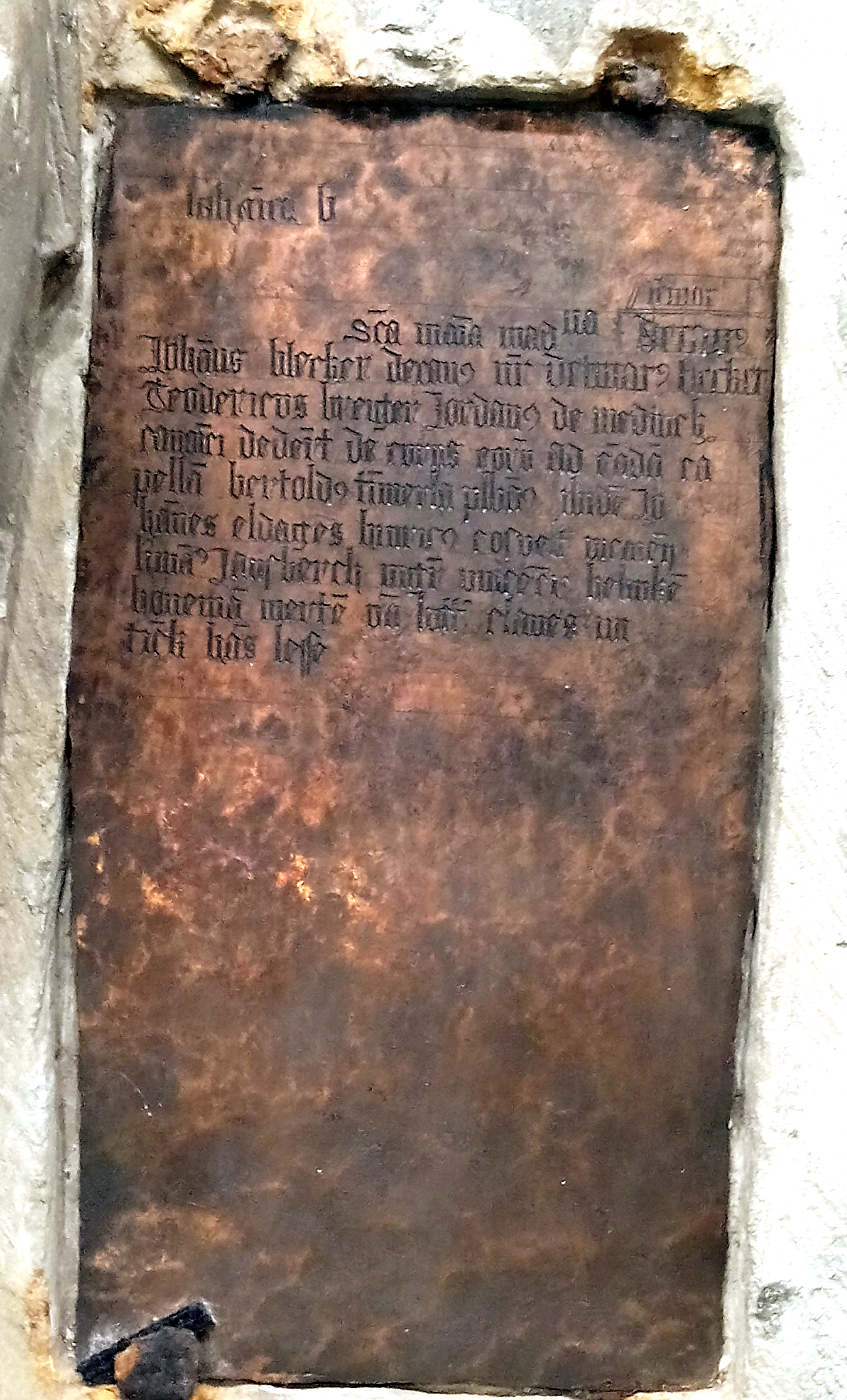 Braunschweig, Maria-Magdalenen-Kapelle: In den Grundstein von 1499 eingelassene Kupferplatte mit Informationen zu den Stiftern.